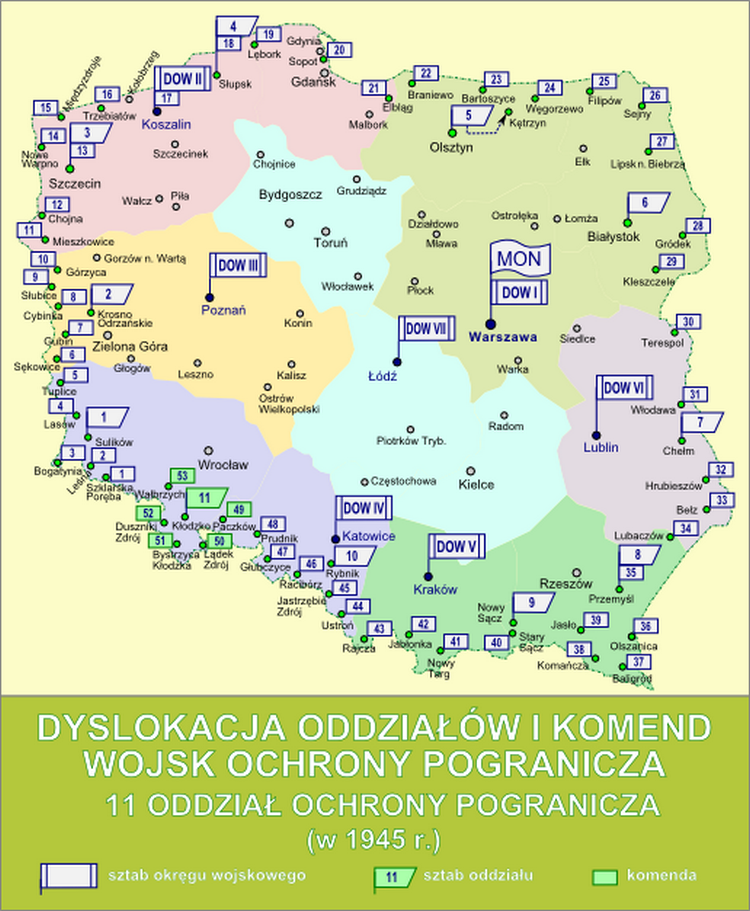 Dyslokacja oddziałów i komend Wojsk Ochrony Pogranicza - 11 Oddz. Ochrony Pogranicza w 1945 r.